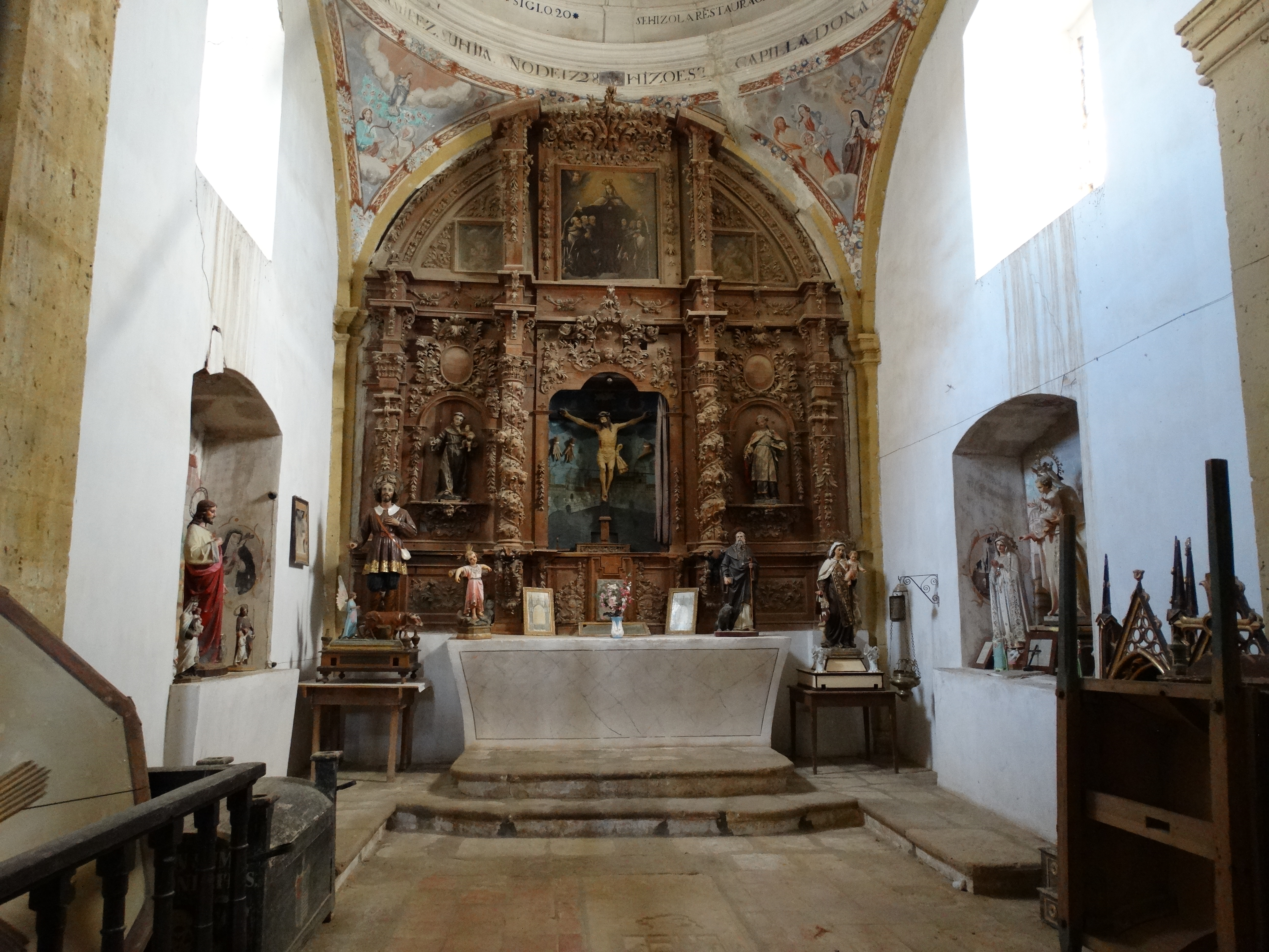 Torremormojón, provincia de Palencia, España. Iglesia de Santa María del Castillo. Capilla Cristo de la Cruz.